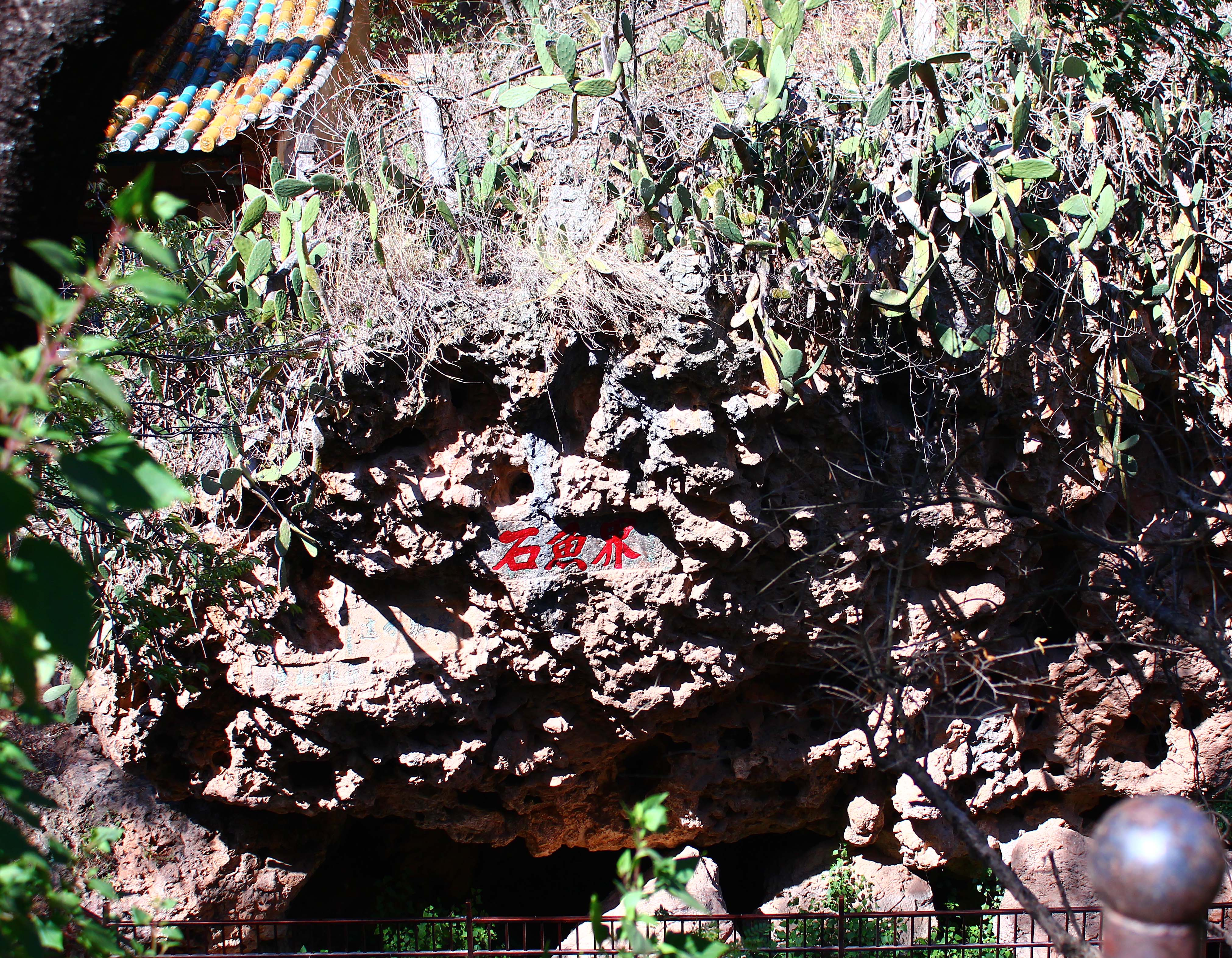 中国云南江川玉带河中部的界鱼石，在“界鱼石”三字左下方有“舜跖分途”“带水披云”石刻。